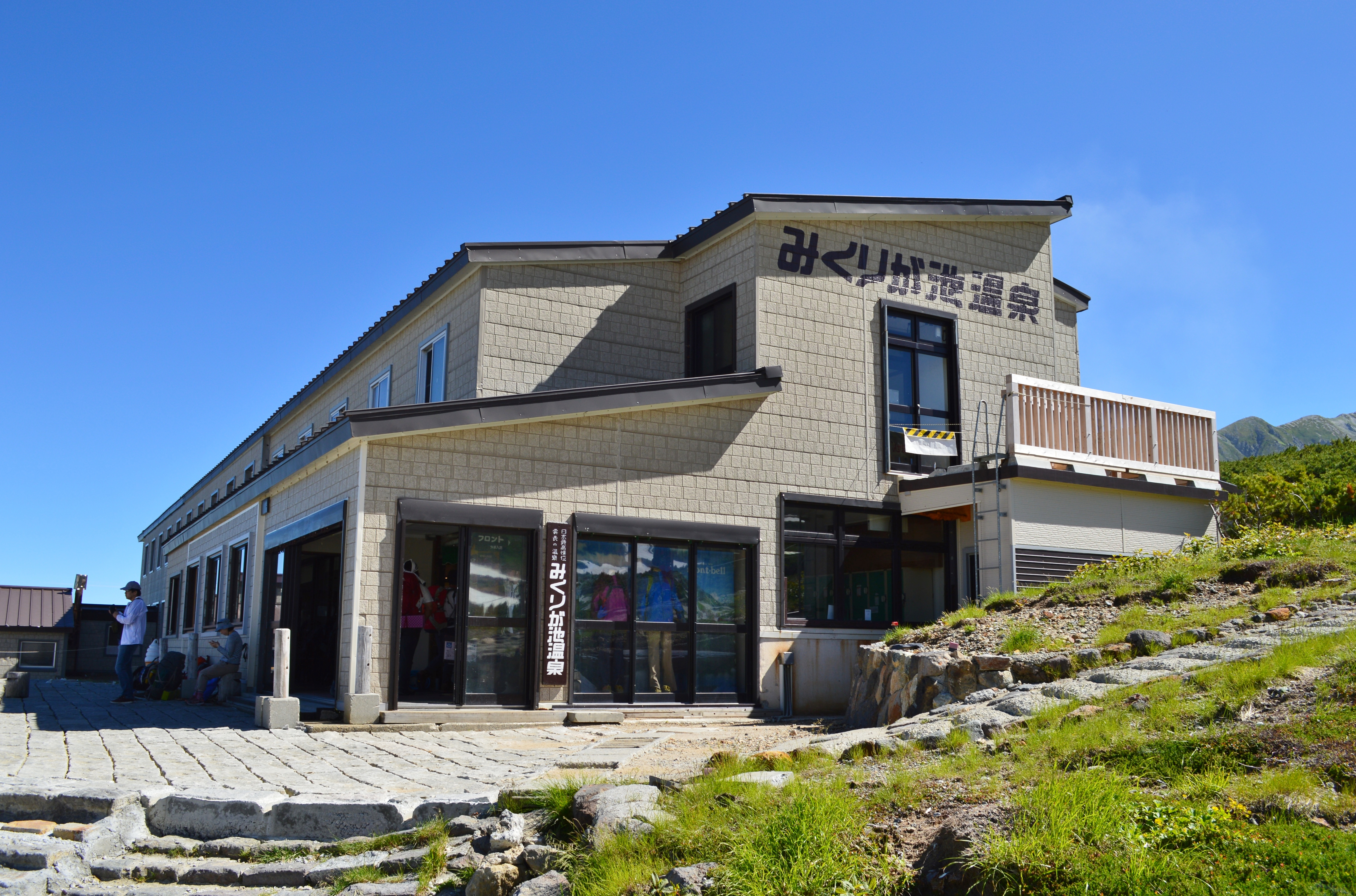 みくりが池温泉 近景